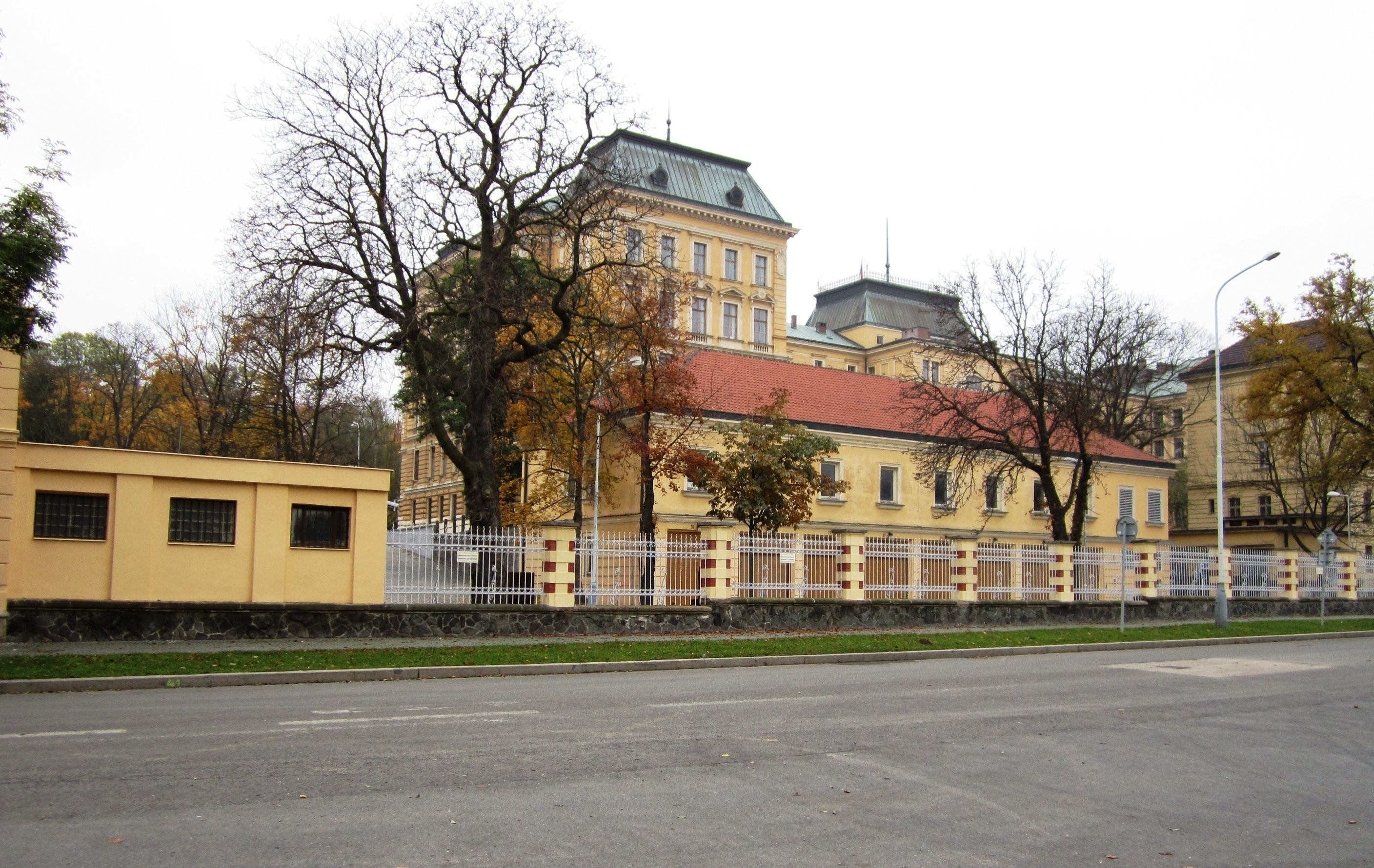 Budova ministerstva obrany, Praha.